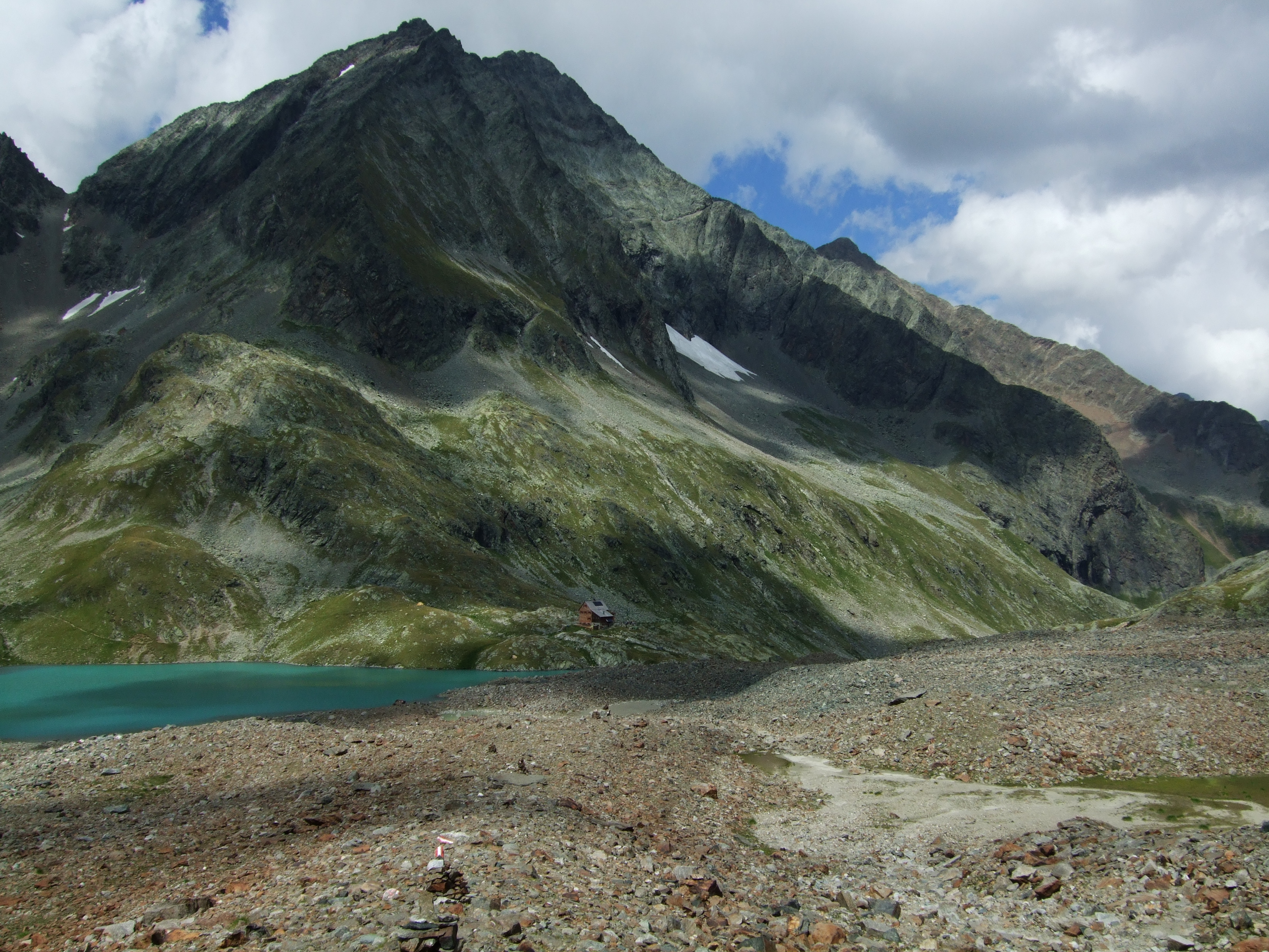 Blick auf die Adolf-Noßberger-Hütte aus Richtung der großen Gradenscharte. Dahinter Klammerscharte (links) und die beiden Hornköpfe.